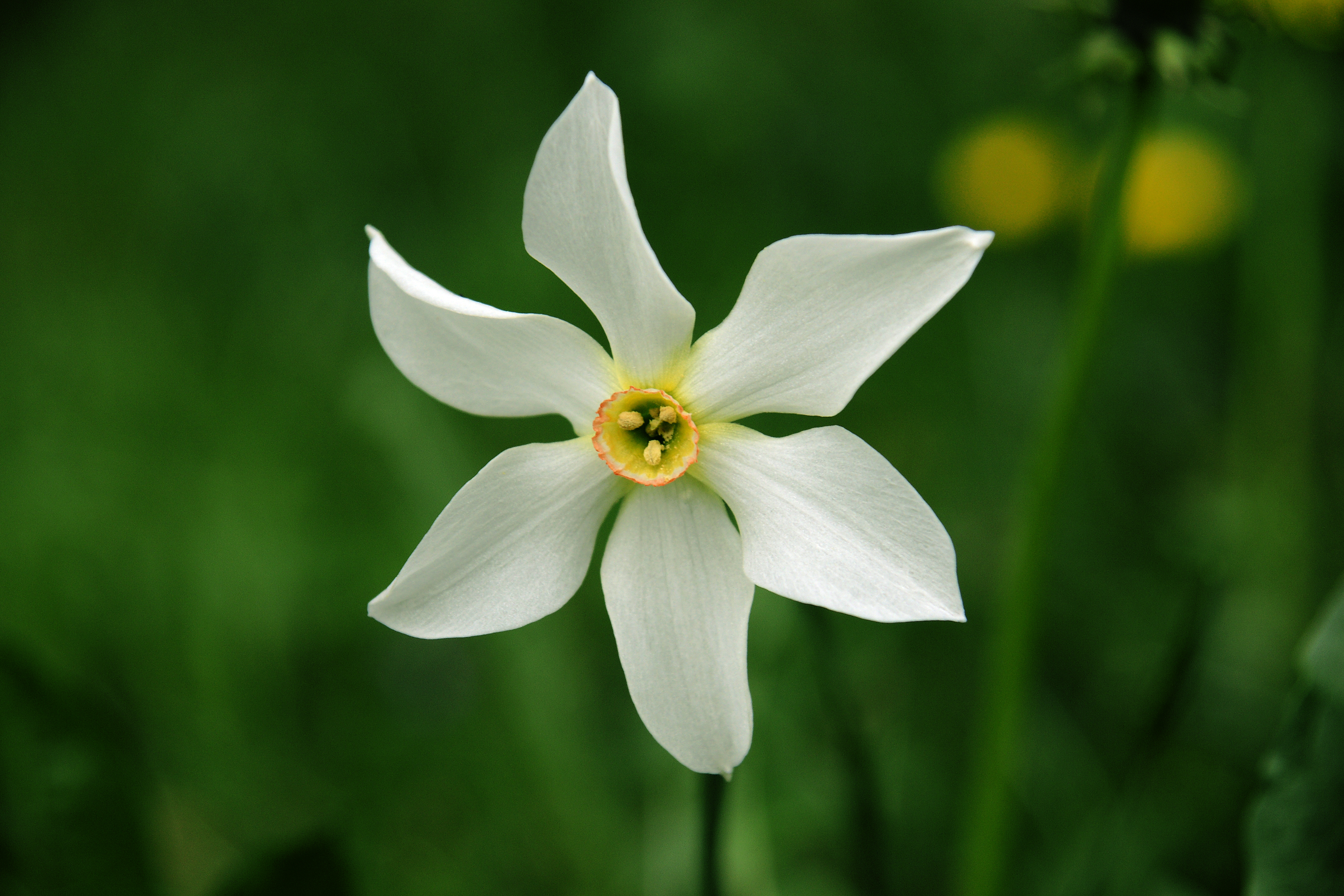 Schmalblättrige Narzisse (Narcissus radiiflorus). Aufgenommen in der Schweiz am Südhang des Vilan, Gemeindegebiet Seewis im Prättigau.